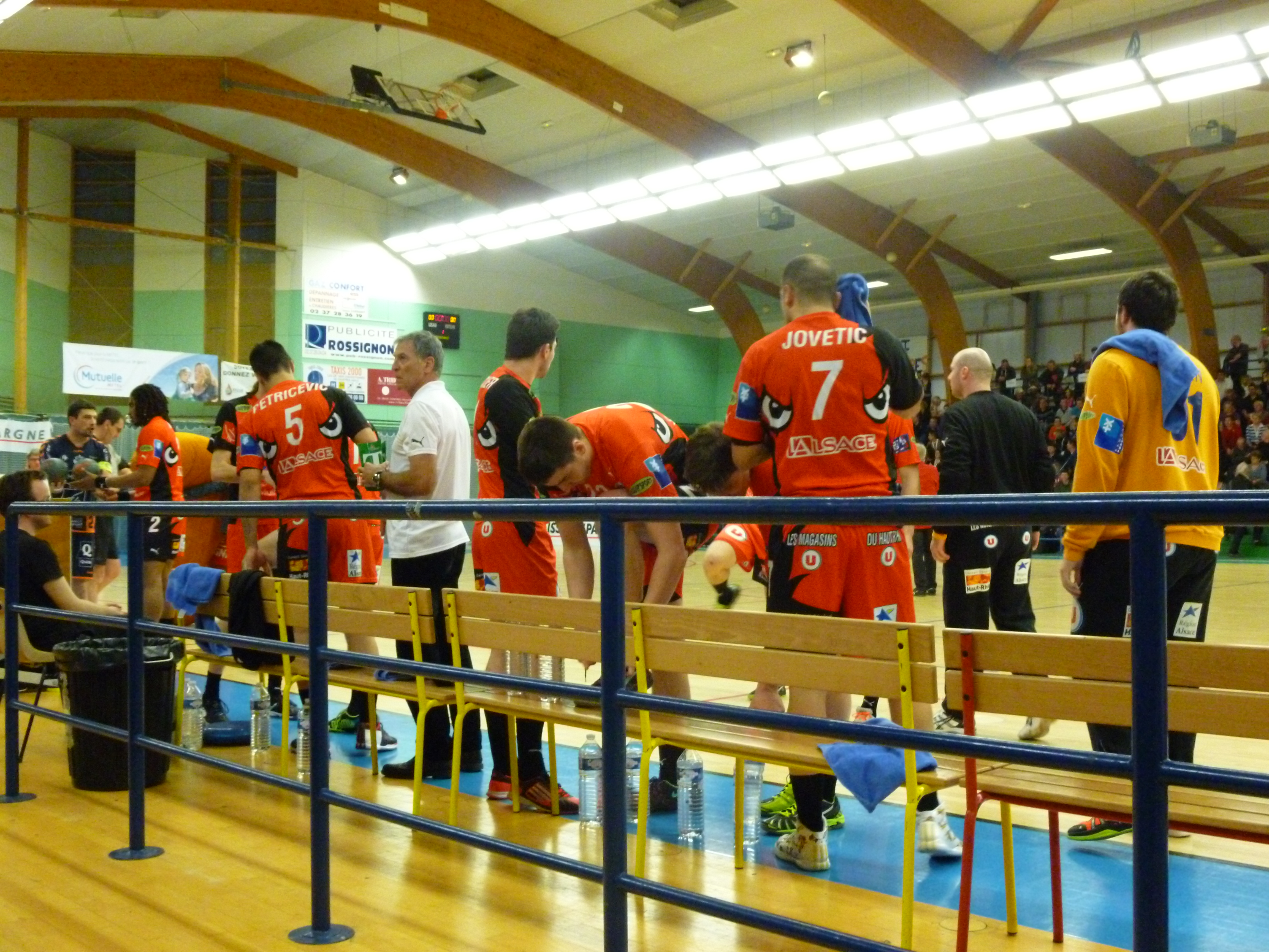 Mulhouse HSA